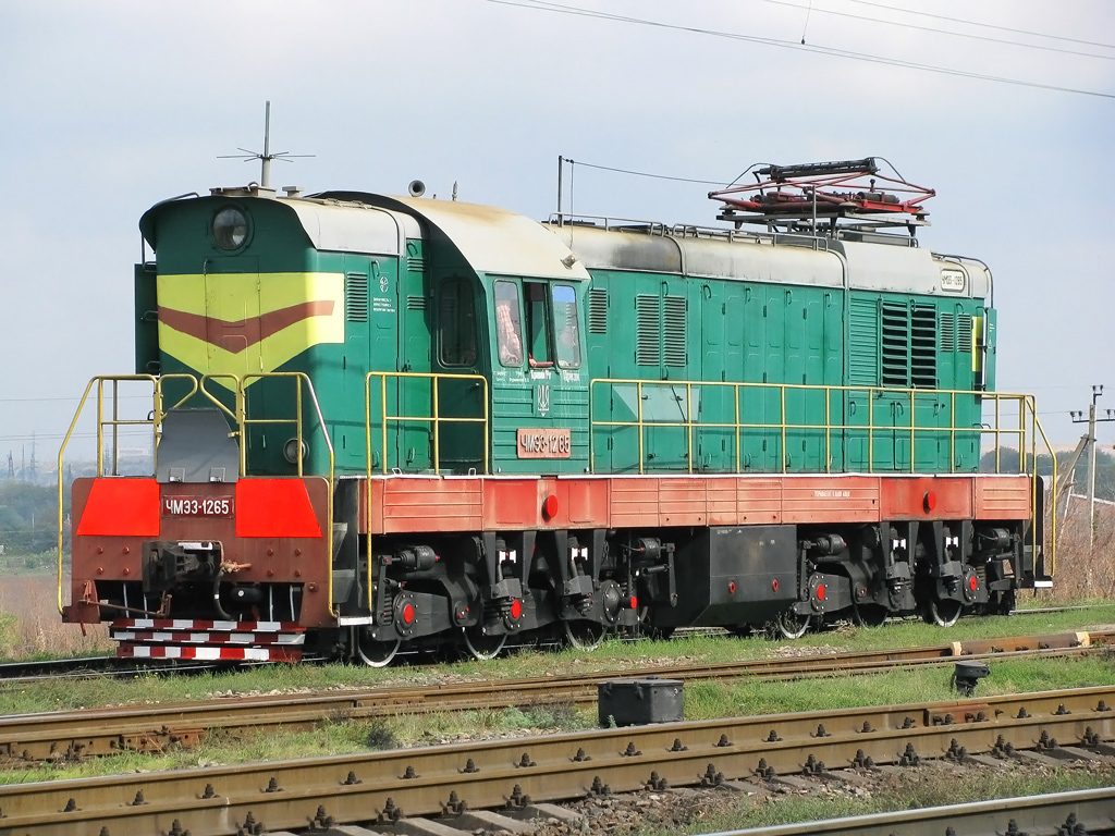 Маневровый тепловоз ЧМЭ3-1265 на ст.Чертомлык, Никопольский р-н, Днепропетровская обл.